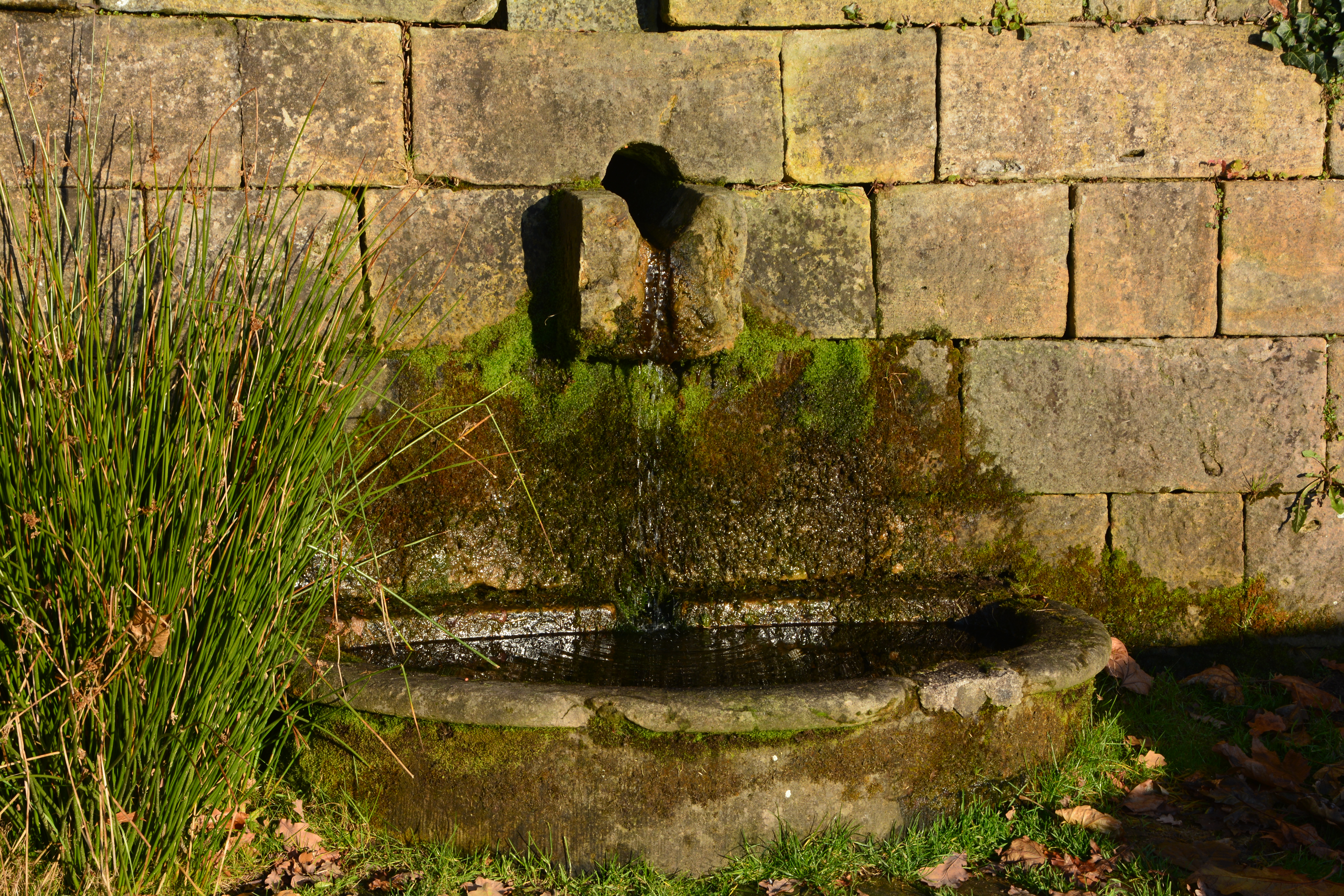 Dresden Lingnerschloss im Herbst, unterhalb der Lingnerterrasse über dem Körnerweg, Brunnen